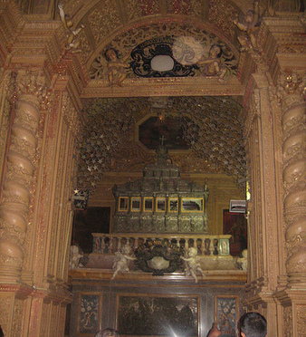 Mausoléo de São Francisco Xavier, na Basílica do Bom Jesus de Goa.